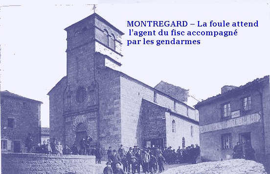 montregard